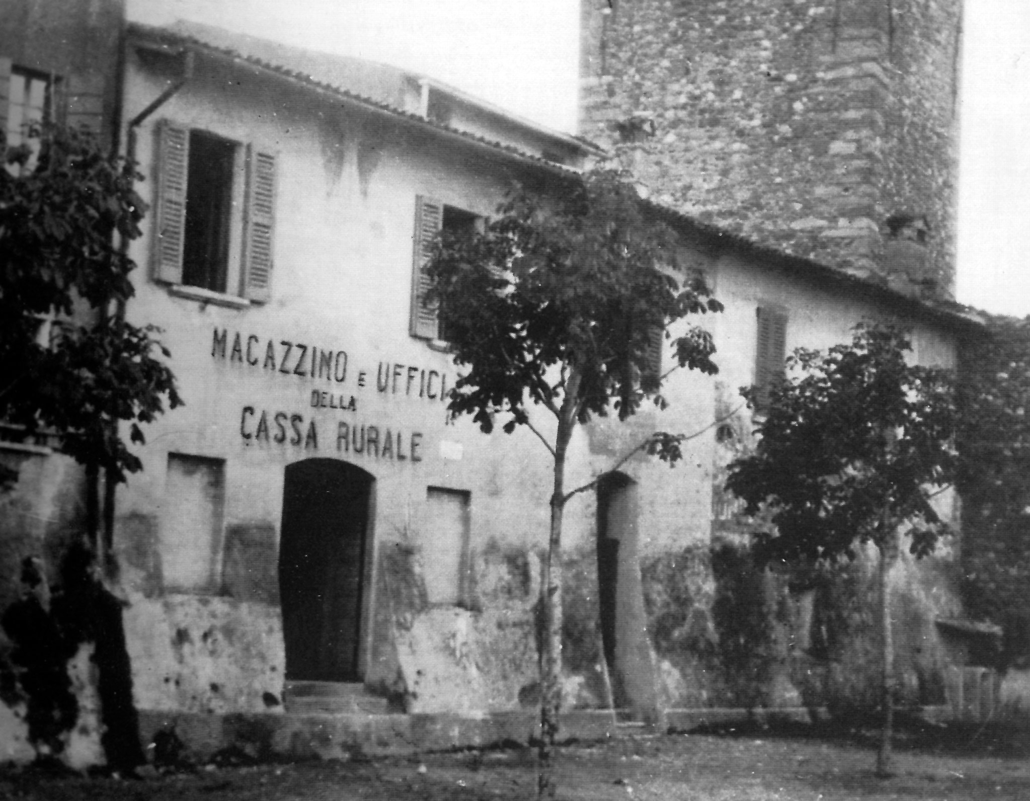 Sede della Cassa Rurale di Bedizzole (Brescia).